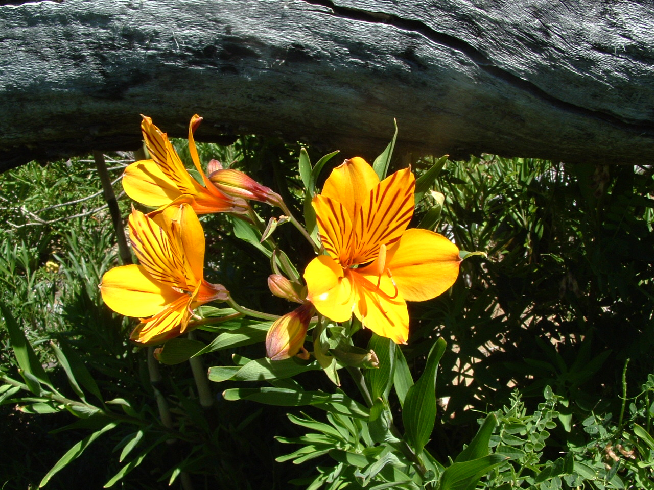 Alstroemeria aurea según Wikipedia. Agrego aquí la leyenda que mencionan mas abajo: "En la orilla derecha del río Manso y hasta su nacimiento en el valle del Lolol Mahuida, vivían los indios Vuriloches. Quintral, hijo del cacique, gustaba recorrer cazando y pescando en la orilla del río y así llegaba hasta Co-carí (lago Mascardi}. Fue en uno de esos paseos que conoció a Amancay, quién se enamoró de aquel joven apuesto y valiente, llegando a convertirse este sentimiento en el amor irrealizable por ser ella de humilde origen. De esta manera fue pasando el tiempo, hasta que un día llegó hasta ellos una epidemia que comenzó a diezmar la tribu, cayendo enfermo el joven indígena. Ante la imposibilidad de lograr su mejoría, enterada Amancay consultó a una Machi (hechicera), a quien le confió el secreto para obtener el remedio. El mismo consistía en una infusión preparada con una flor que crecía en la cumbre helada del Lolol Mahuida a sabiendas del peligro que corría, pero impulsada por su amor hacía el joven, lanzóse Amancay a la terneraria empresa, logrando su fin. Ya en el descanso, feliz por haber logrado su cometido, al pie de una hermosa cascada, vio cernirse sobre ella la amenazante figura del cóndor, quien le exigió abandonara la preciada flor. Ante la negativa de Amancay propuso a esta que le dejase en cambio su corazón, lo cual aceptó la joven sin titubear. Alejóse el rey de las alturas con el pequeño corazón entre sus garras, emprendiendo vuelo hacia su morada, tiñendo de gotas rojas su camino con la sangre que manaba del corazón. Y en aquellos lugares regados y vivificados con la sangre de aquella indiecita, fue floreciendo una preciosa flor de varios pétalos, bella como su origen, teñida con gotas rojas de la sangre que había sido derramada en ofrenda de aquel sentimiento, queriendo pregonar de esta manera, un mensaje de amor por todos los valles y montañas del Co-carí."